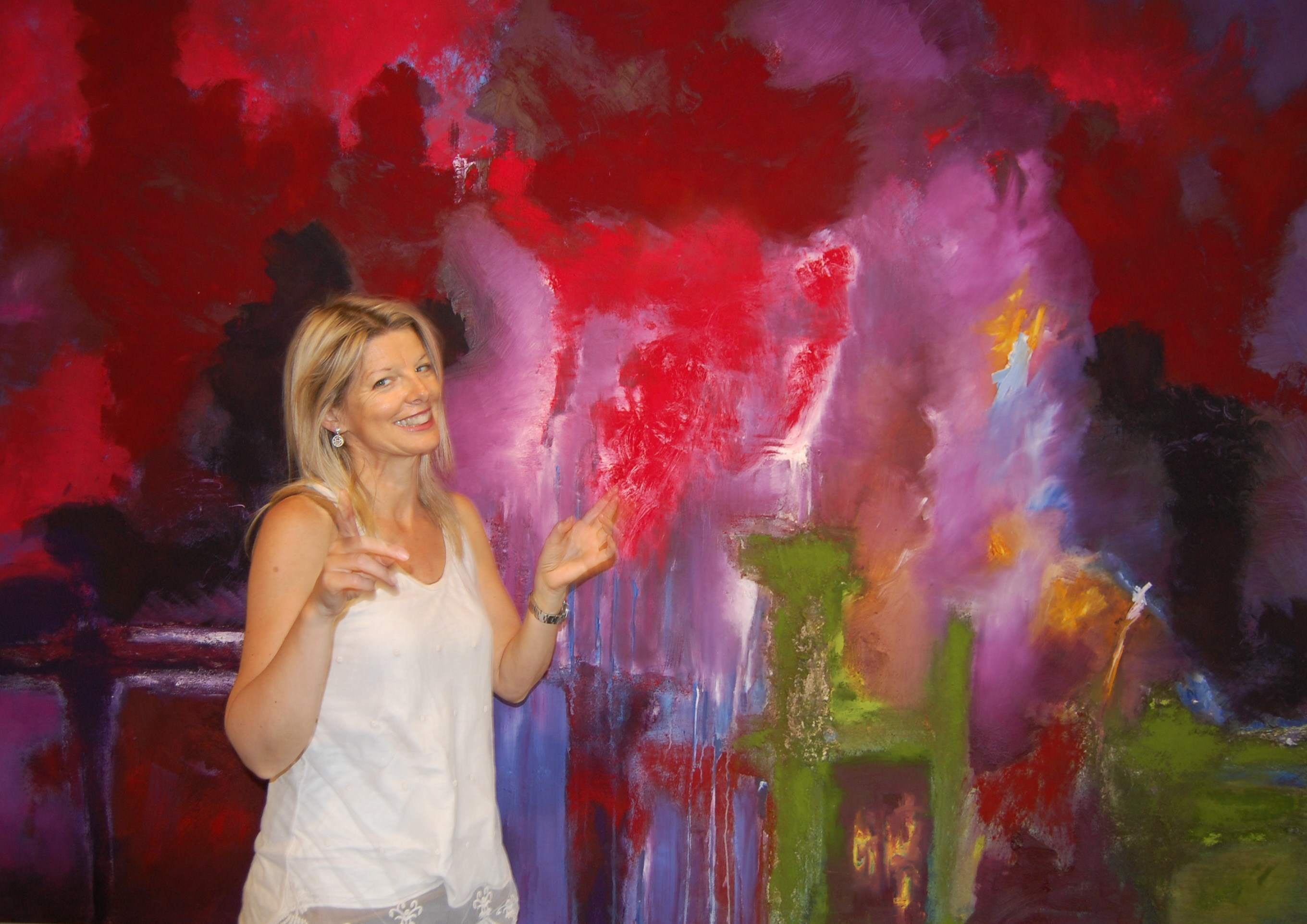 Brigid Ibell (* 1958) vor einem ihrer wandfüllenden Gemälde (Juni 2011)